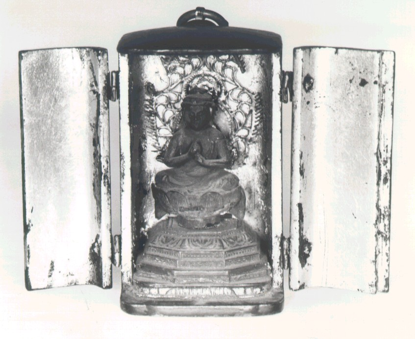 Ołtarzyk szafkowy buddy Wairoczany